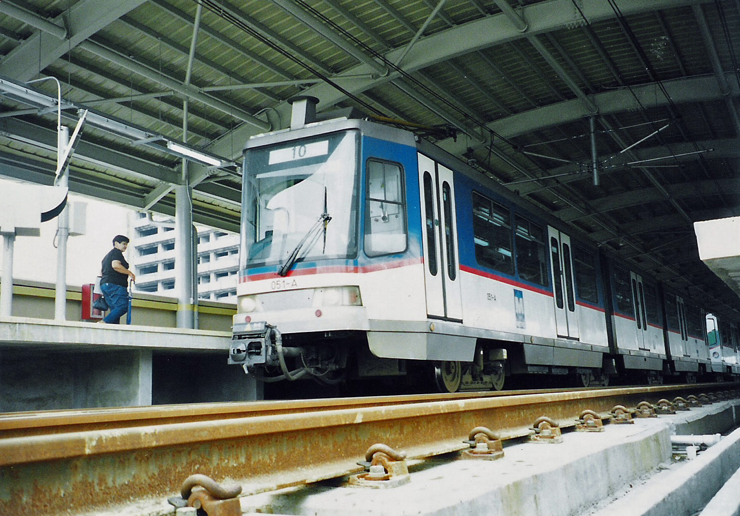 Tatra RT8D5M in Manila MRT-3 Magallanes Station at Pasong Tamo.